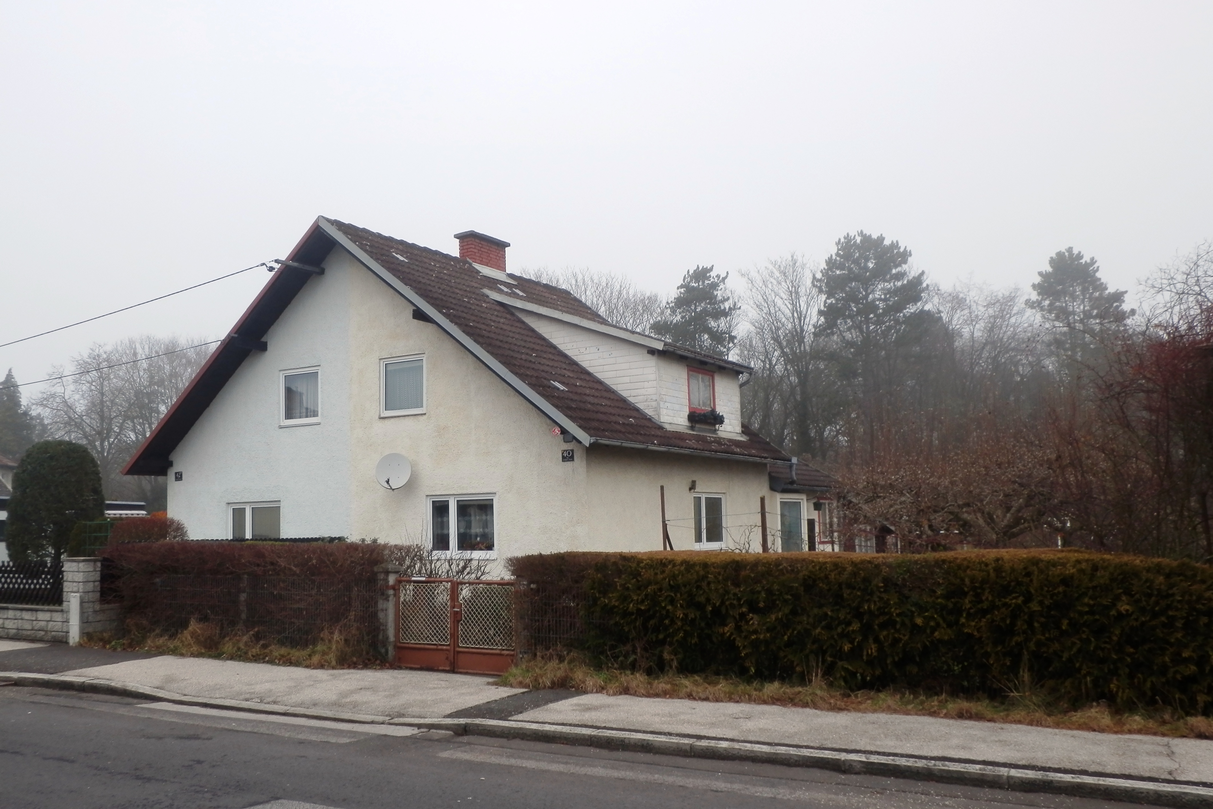 Stadtrandsiedlung Schörgenhub, Linz, Am Langen Zaun